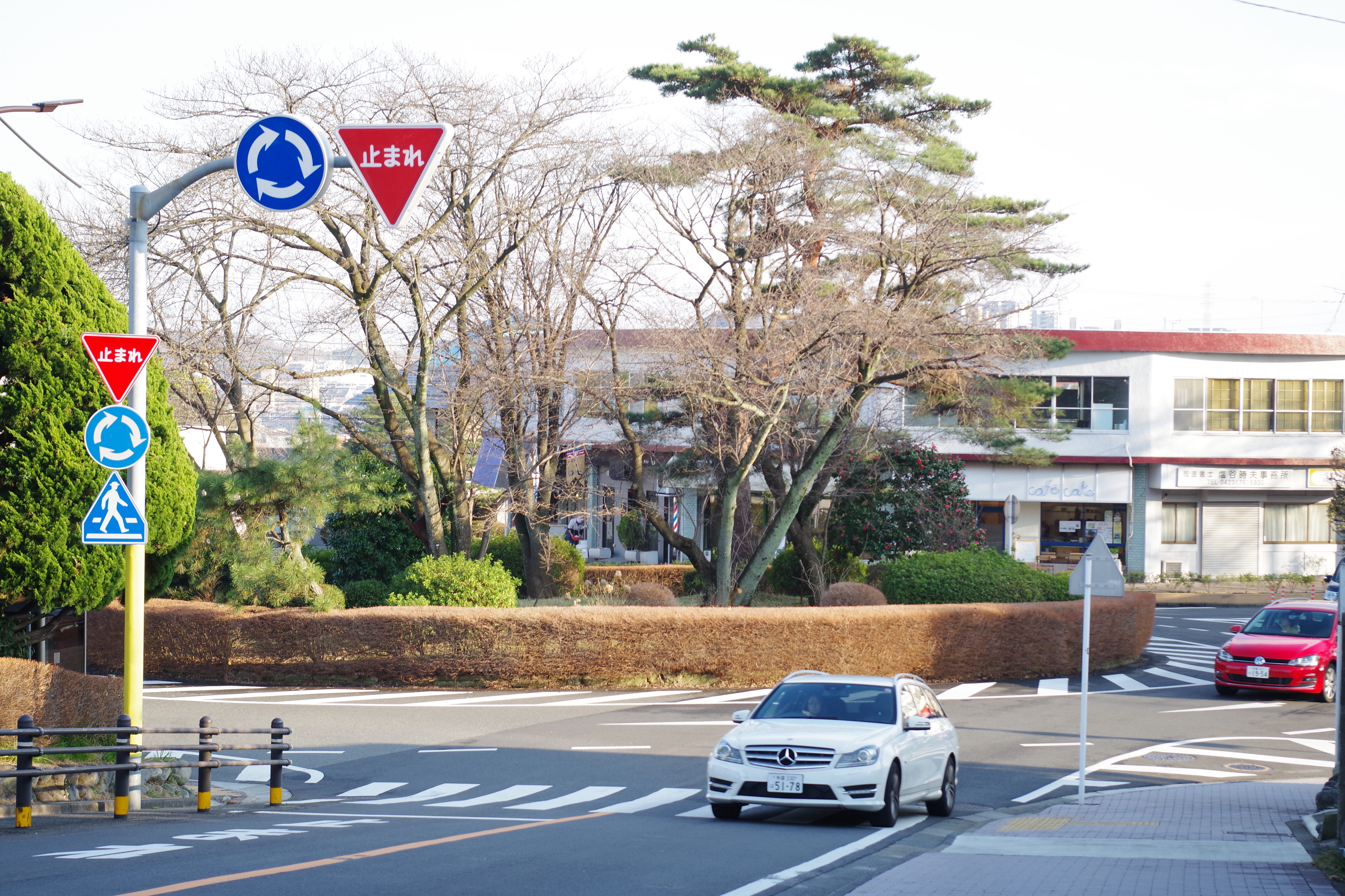 多摩市桜ケ丘にある東京都で唯一の環状交差点（ラウンドアバウト）160319